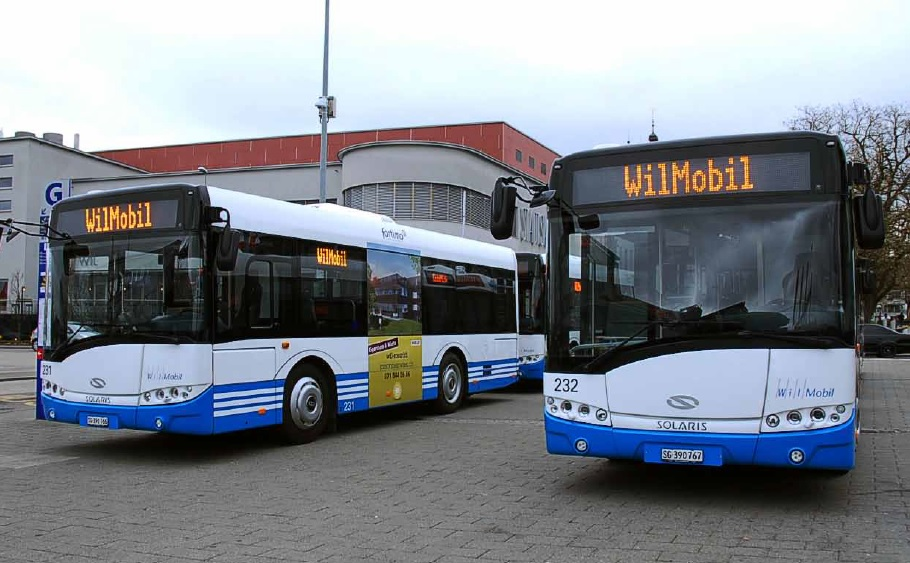 Bahnhofplatz Wil SG mit Bussen des Regionalverkehrsunternehmen WilMobil